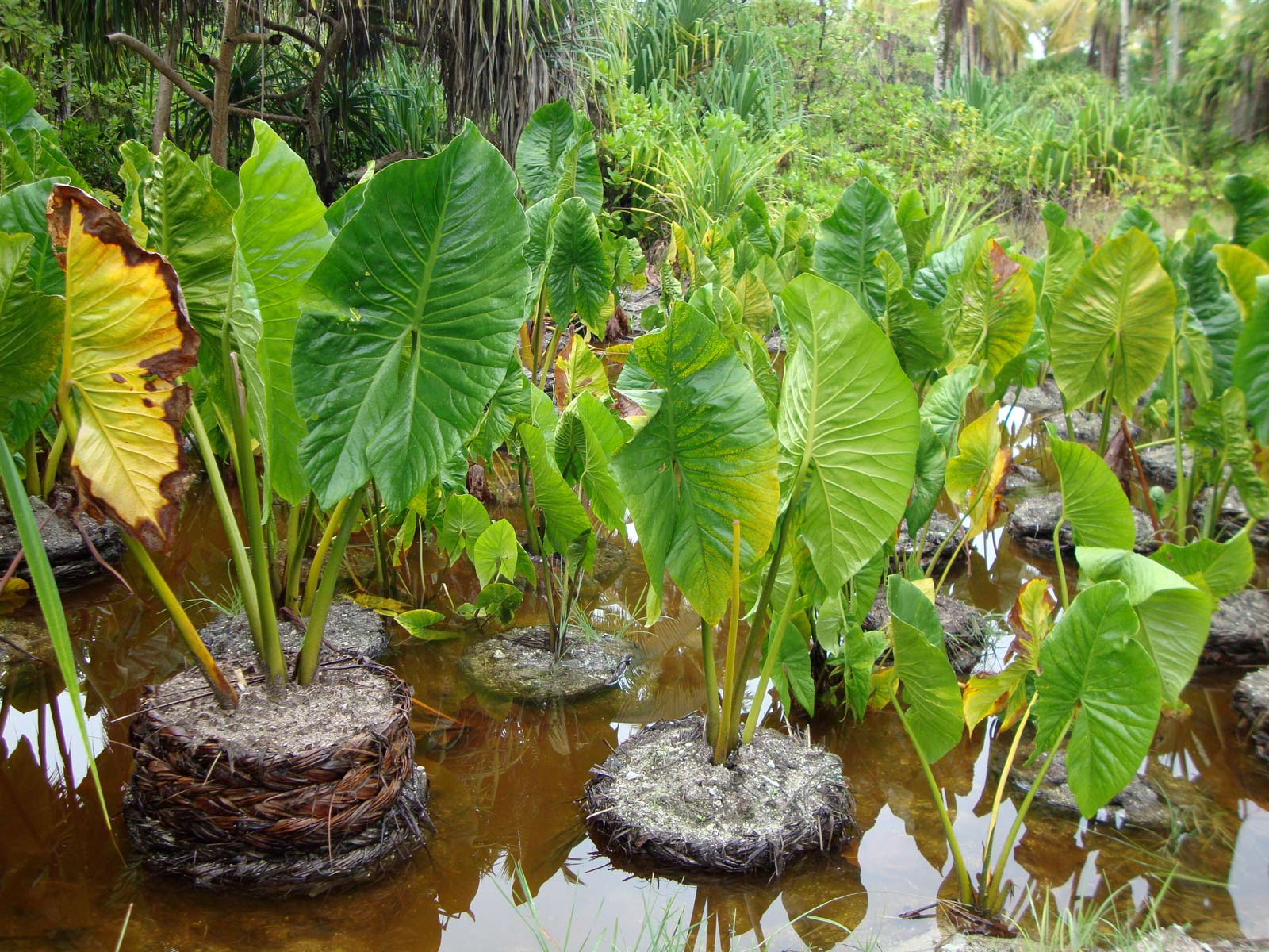 Cyrtosperma chamissonis = Cyrtosperma merkusii plantation on Butaritari, Kiribati